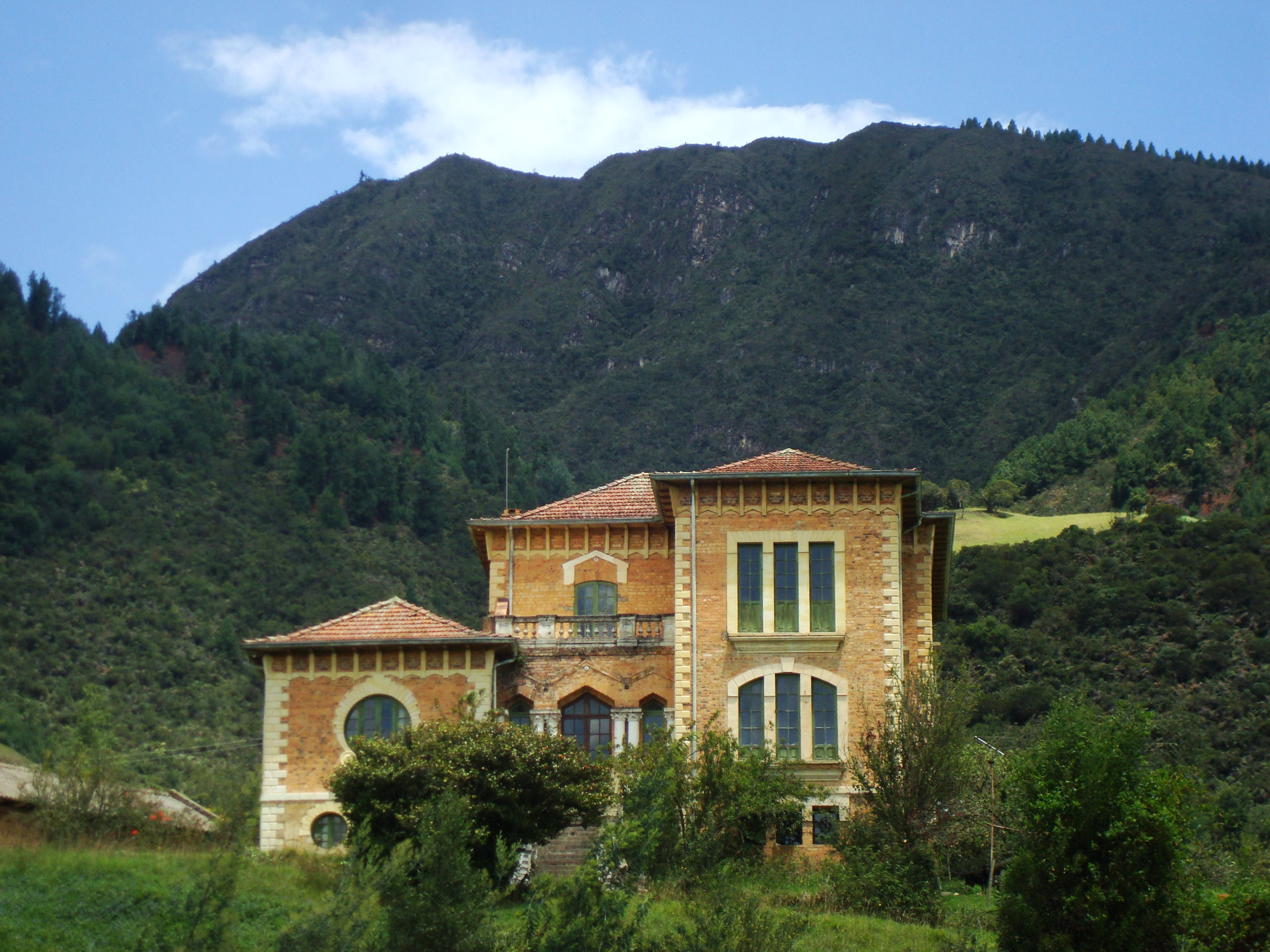 Ubicación: SESQUILE, CUNDINAMARCA